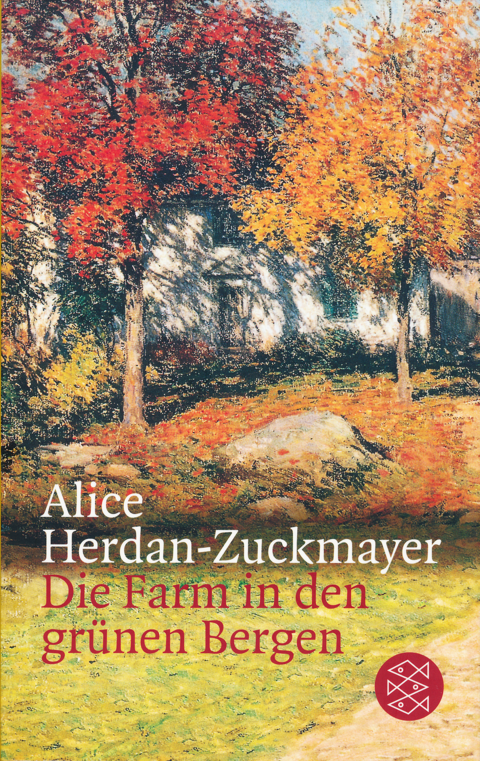 Das Fischer Taschenbuch Die Farm in den grünen Bergen. Das Cover zeigt einen Ausschnitt des Gemäldes October von Willard Leroy Metcalf